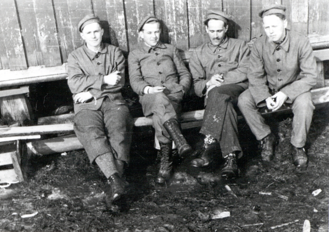 Fire fanger på Falstad Nedre 1942. Fra venstre: Arne Fjellbu, Per Jahn Aagaard Kiønig, Viggo B. Heirung og John Arnstad. Four Prisoners at Falstad Nedre 1942. From the left: Arne Fjellbu, Per Jahn Aagaard Kiønig, Viggo B. Heirung and John Arnstad. Dato / Date: 1942. Fotograf / Photographer: ukjent / unknown. Sted / Place: Ekne, Nord-Trøndelag, Norge / Norway. Arkivreferanse /Archive reference: FSM foto 0700174.